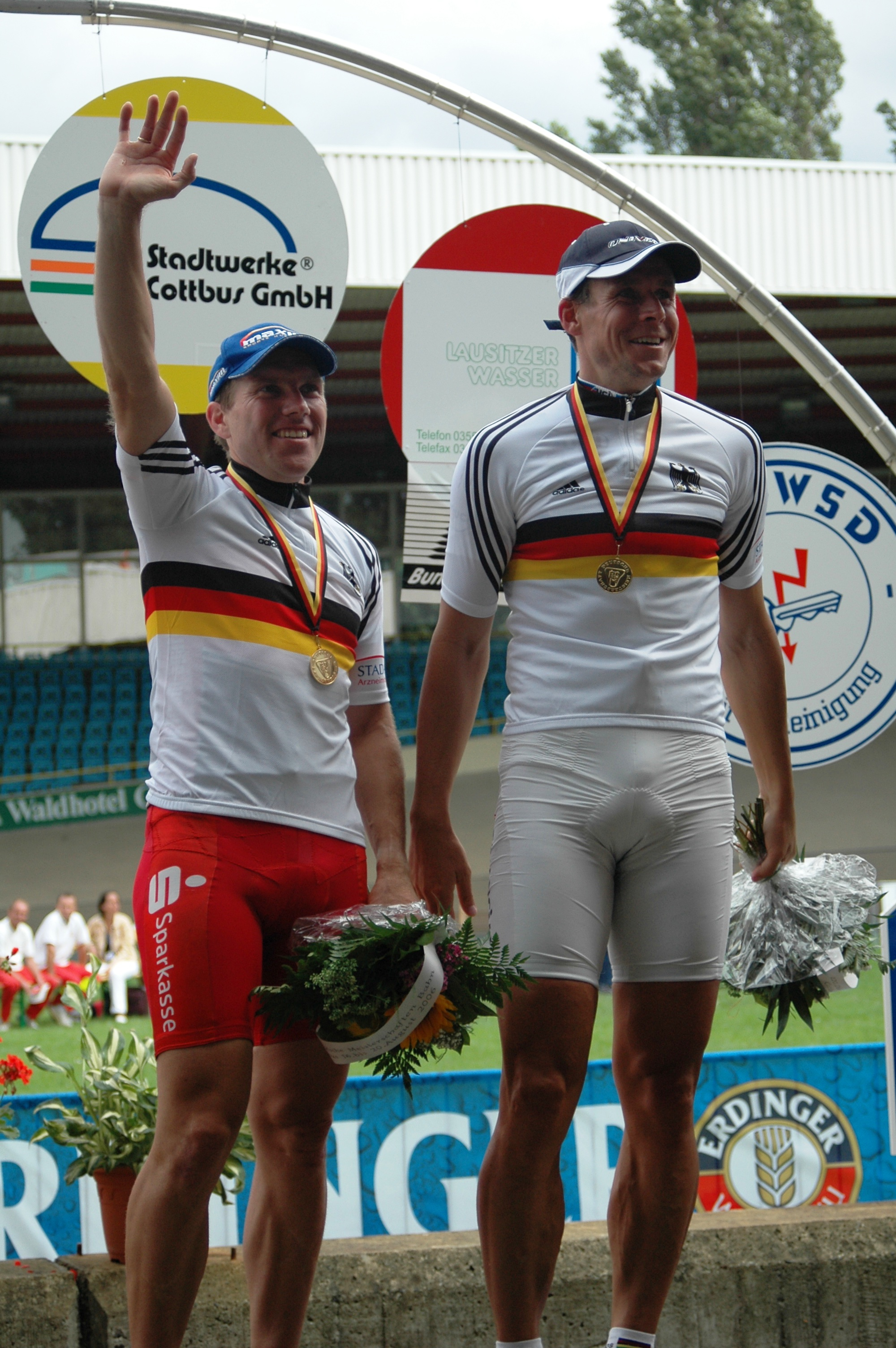 Deutsche Meister im Zweier-Mannschaftsfahren: Andreas Beikirch (l.), Robert Bartko